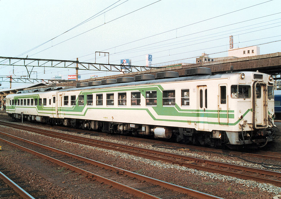 JR九州 キハ65 61+キハ58 700 「サウンドエクスプレスひのくに」